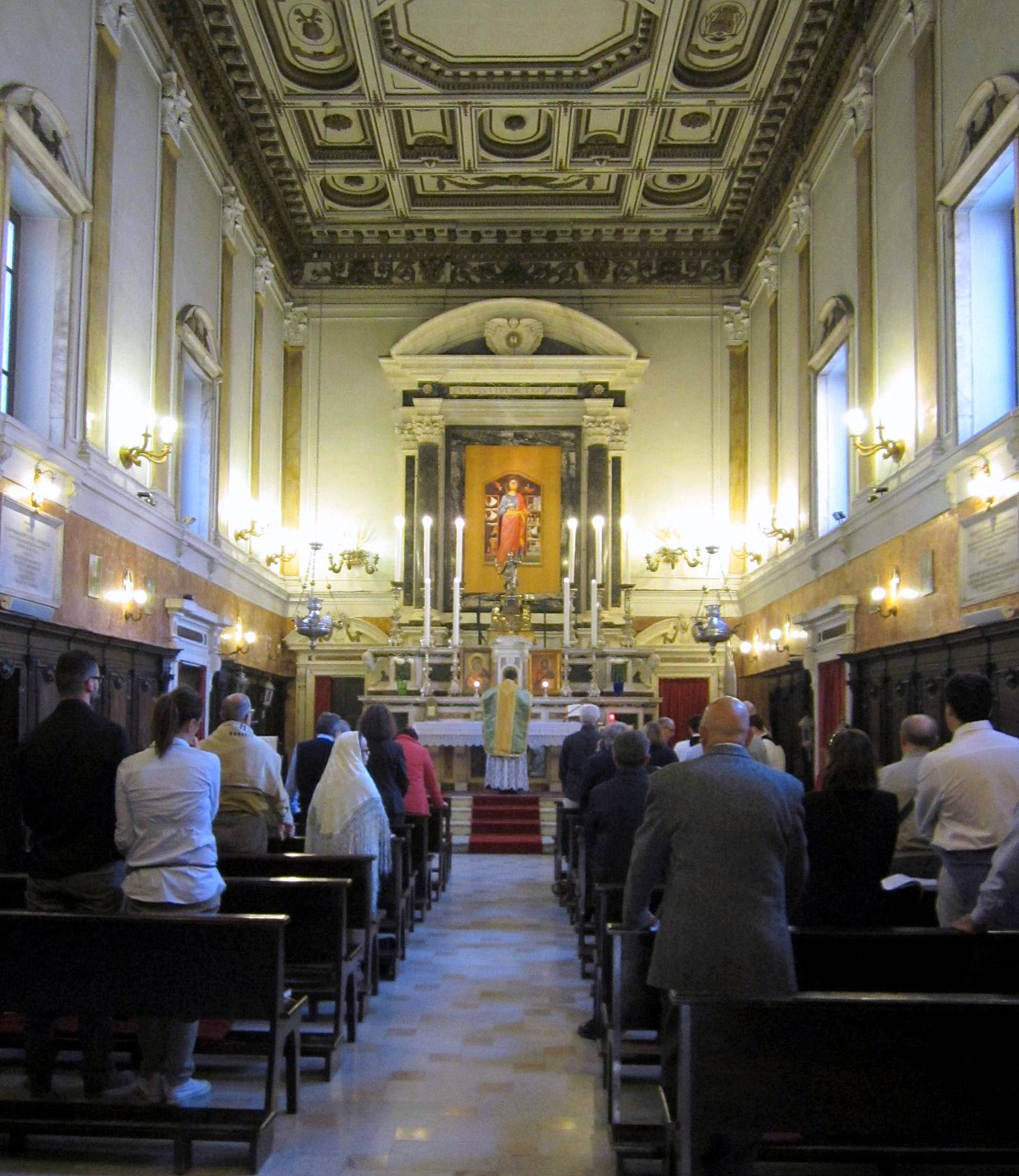 Chiesa di Santa Giulia a Livorno, Interno